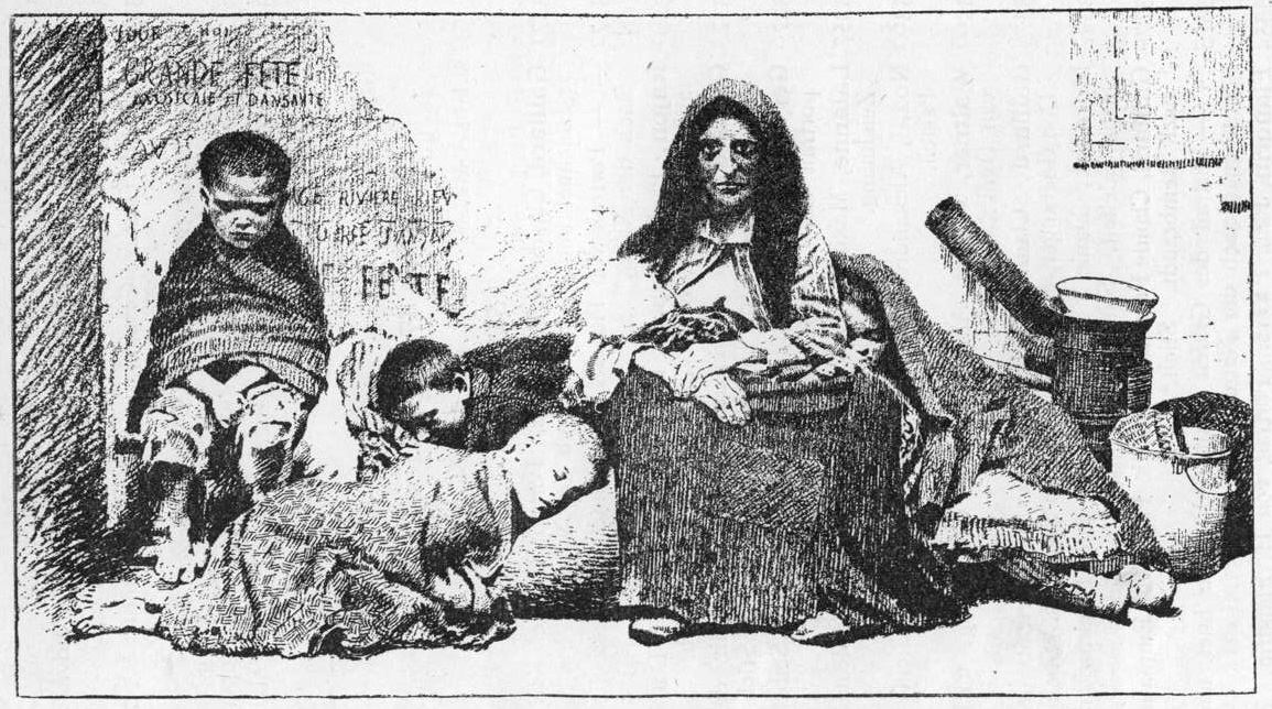 Obdachlos